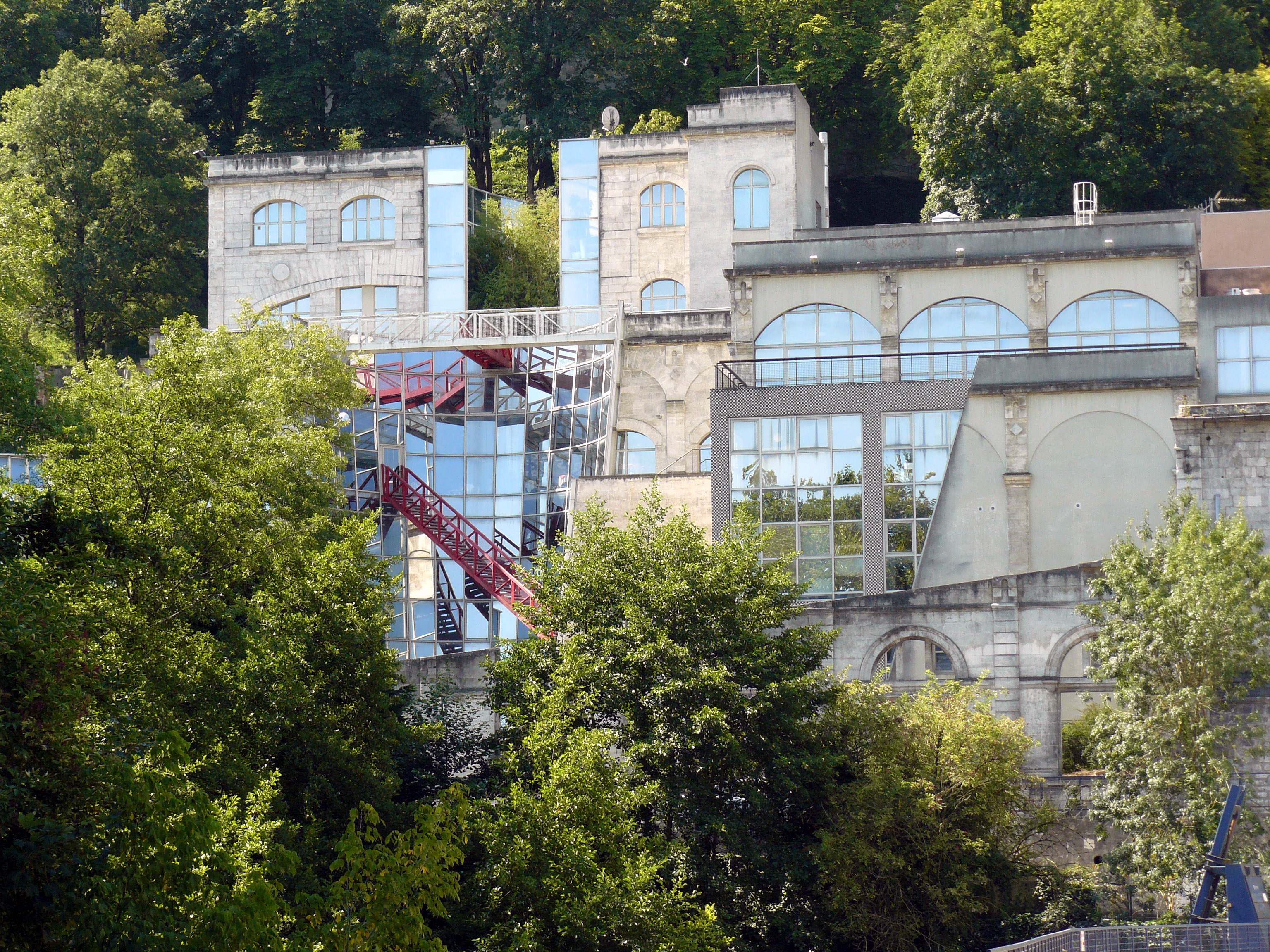 CNBDI vu depuis "le Nil"